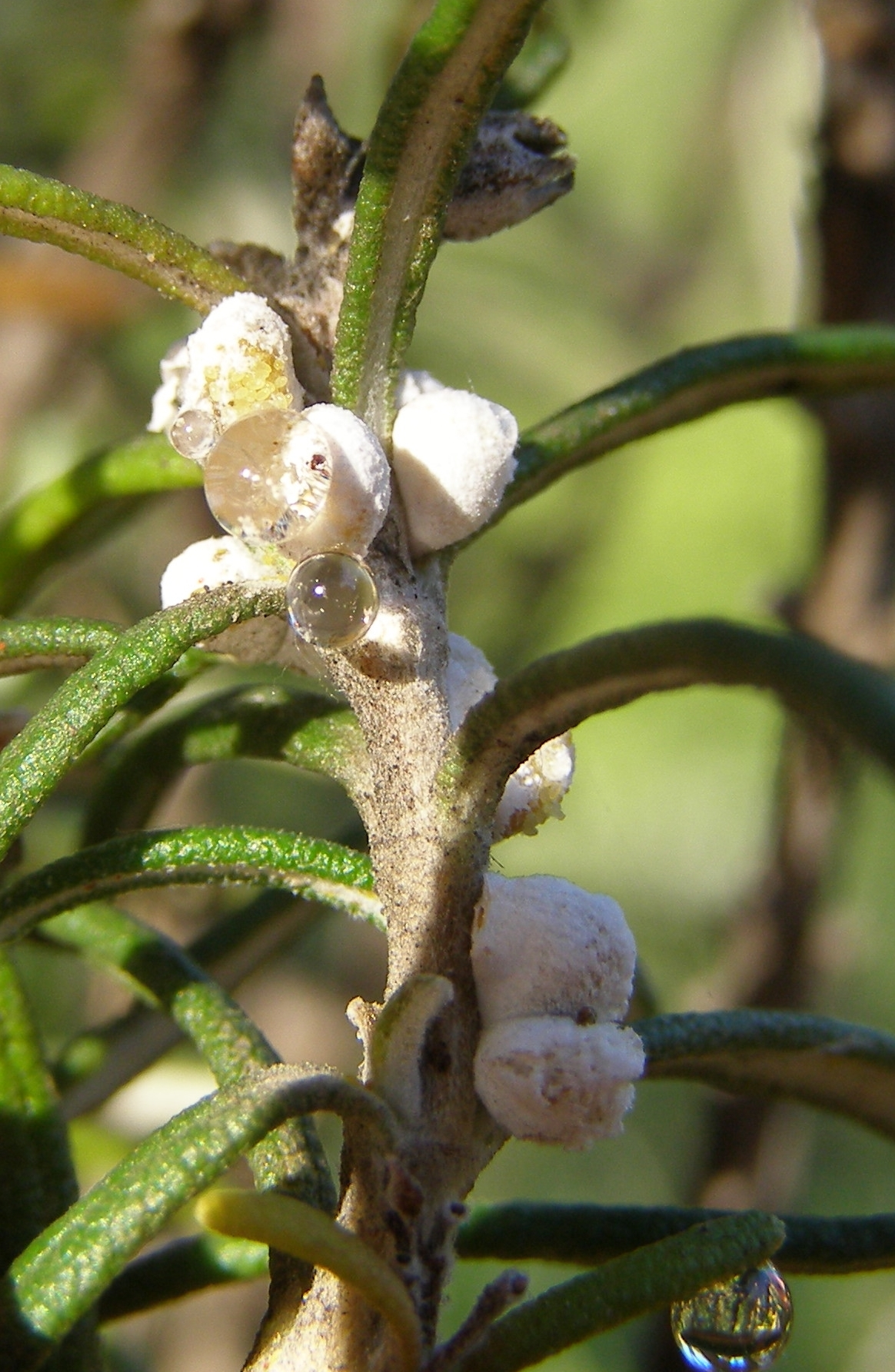 Amonostherium rorismarinis, Pseudococcidae (Matile ID). Espèce inféodée au romarin (Rosmarinus officinalis). Crematogaster scutellaris, Formicidae, est friande de leur miellat.